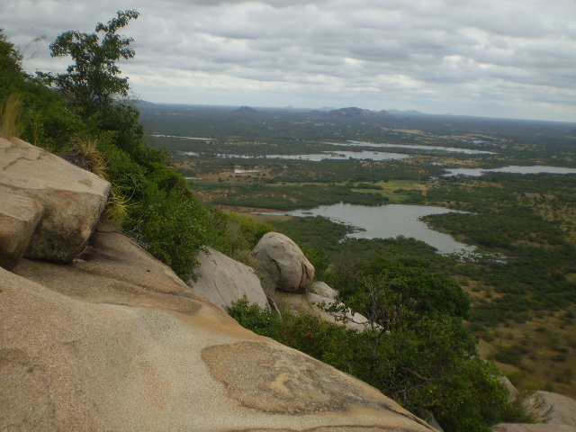 Vista de cima da serra do pico, considerada uma das serras mais belas do Brasil.